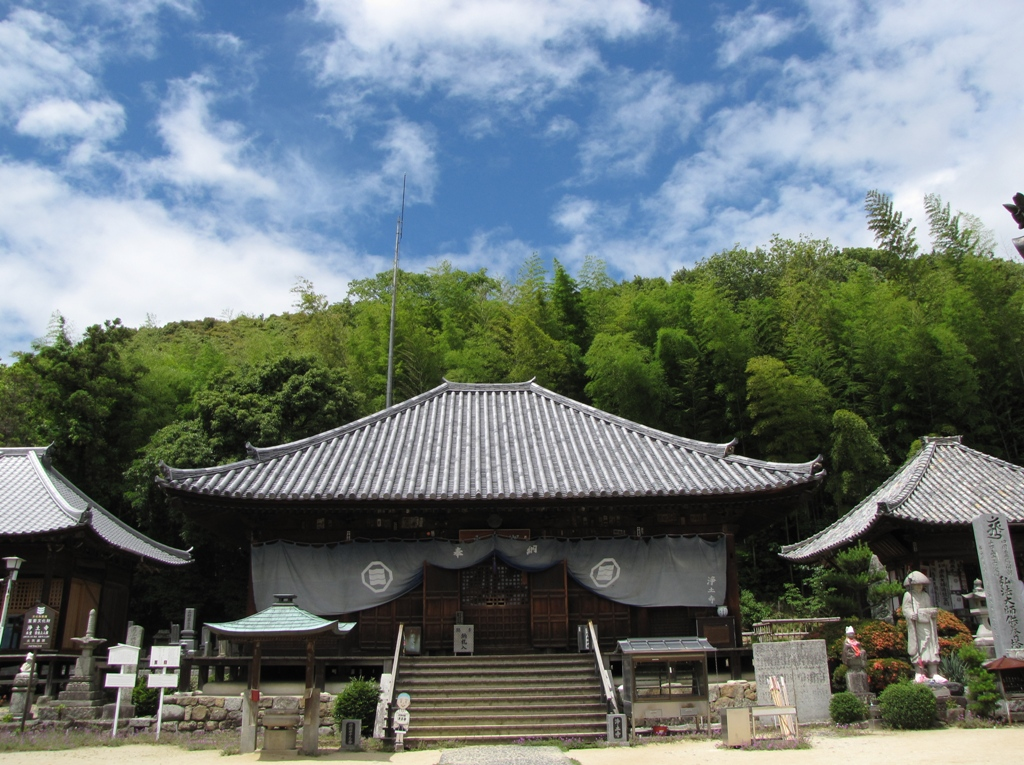 浄土寺（松山市）本堂。